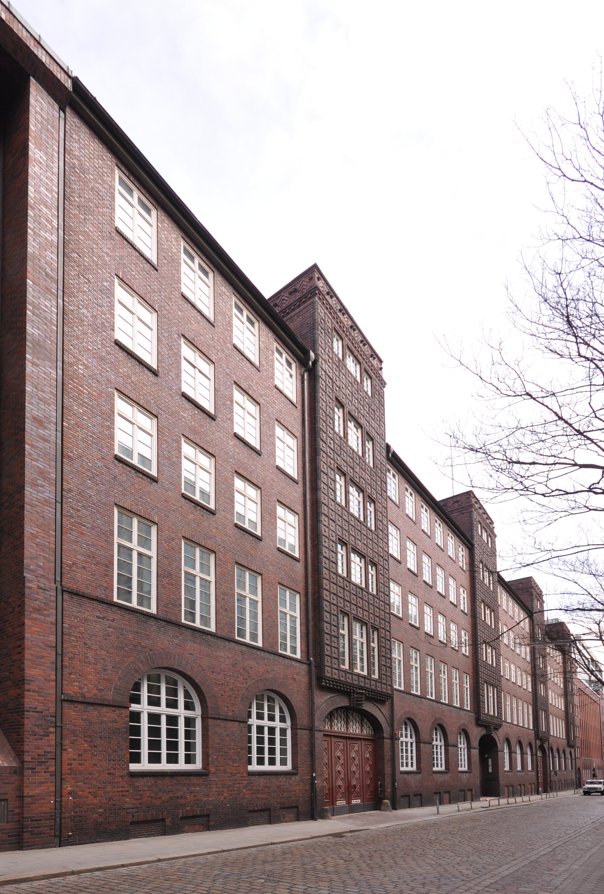 Gebäude Drehbahn 36 in Hamburg-Neustadt, Sitz der Hamburger Justizbehörde.